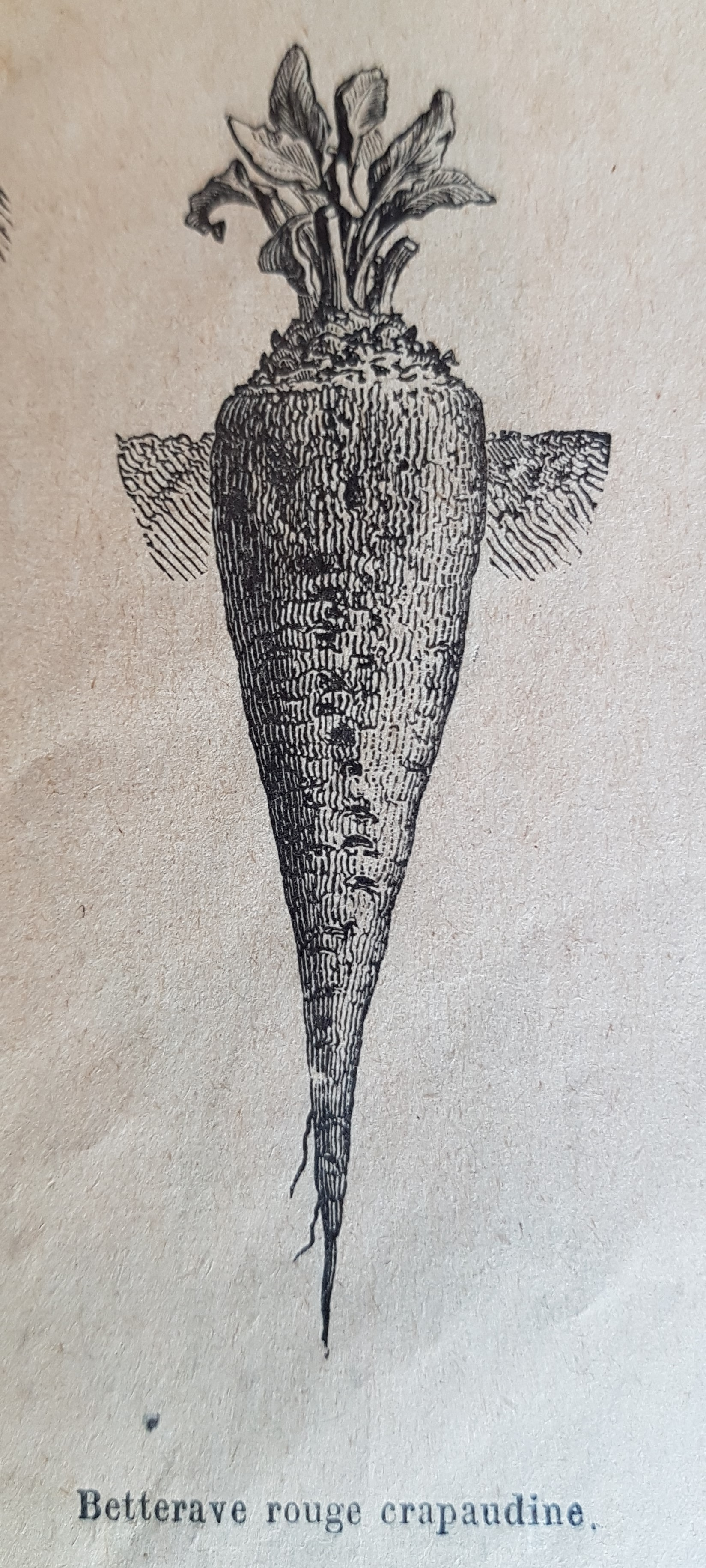 Illustration de la variété de betterave rouge crapaudine dans le catalogue Vilmorin-Andrieux du printemps 1900